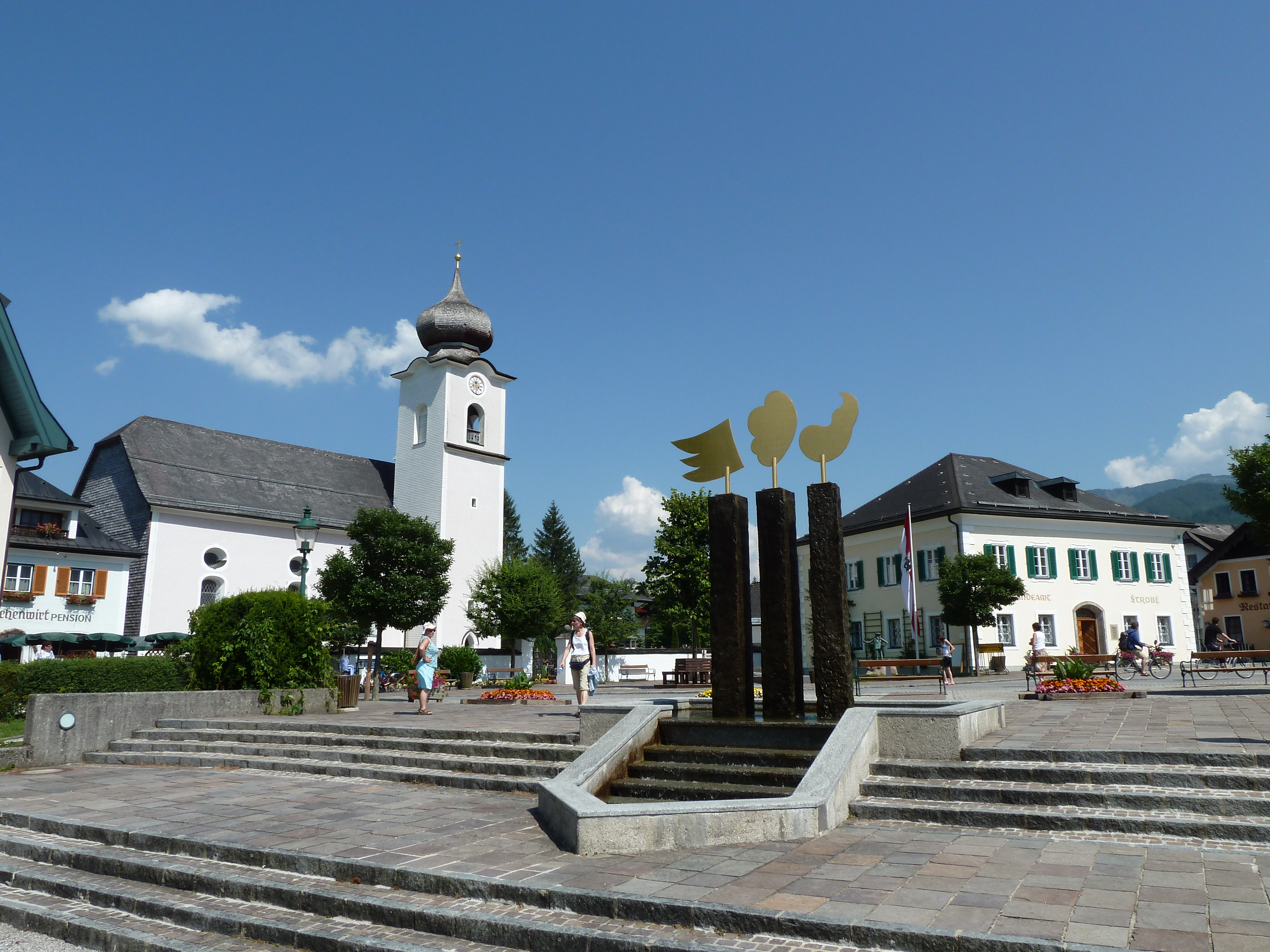 St. Sigismund und Rathaus in Strobl